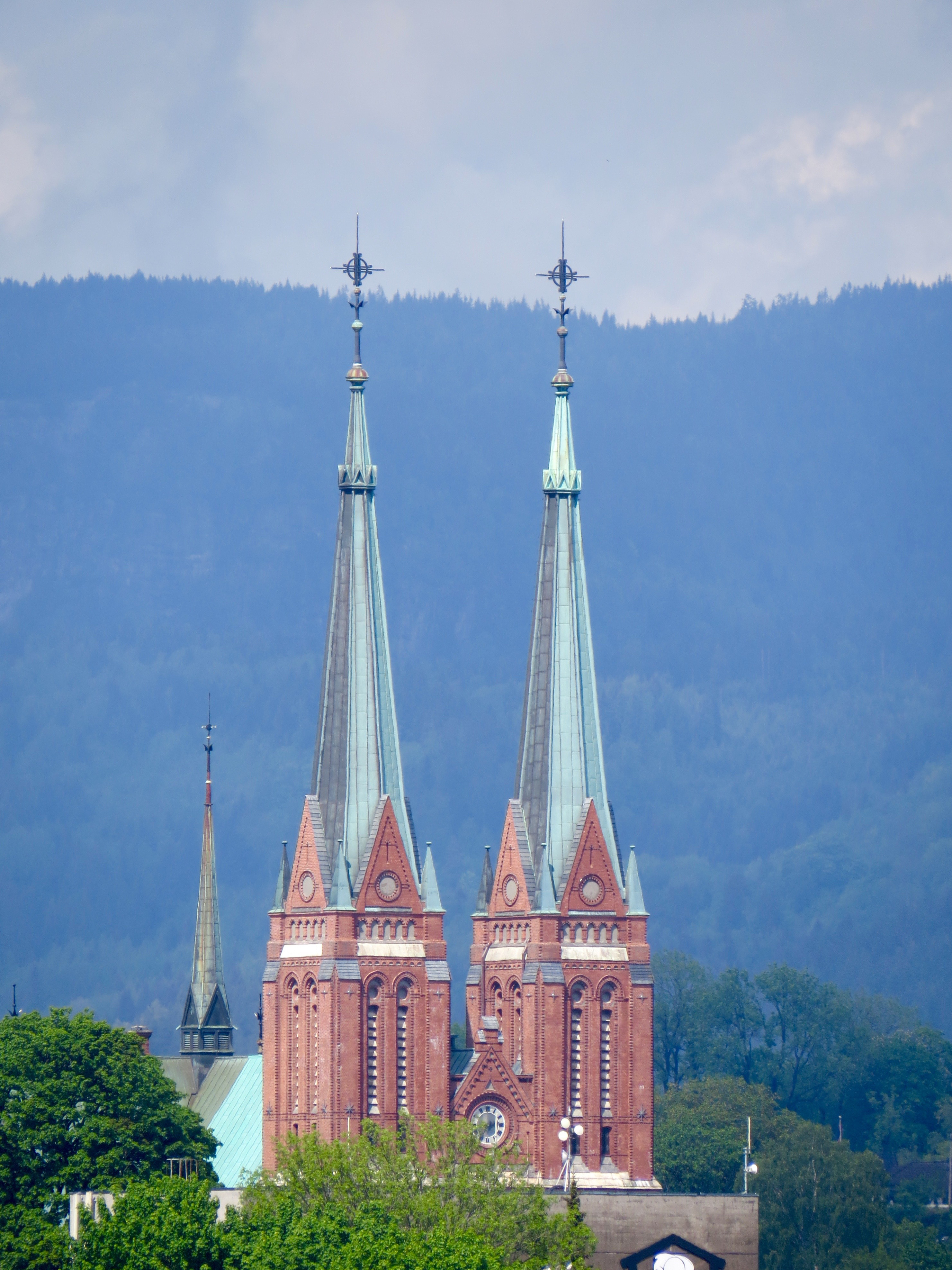 Skien Kirkes tvillingetårn, Skien, Telemarken